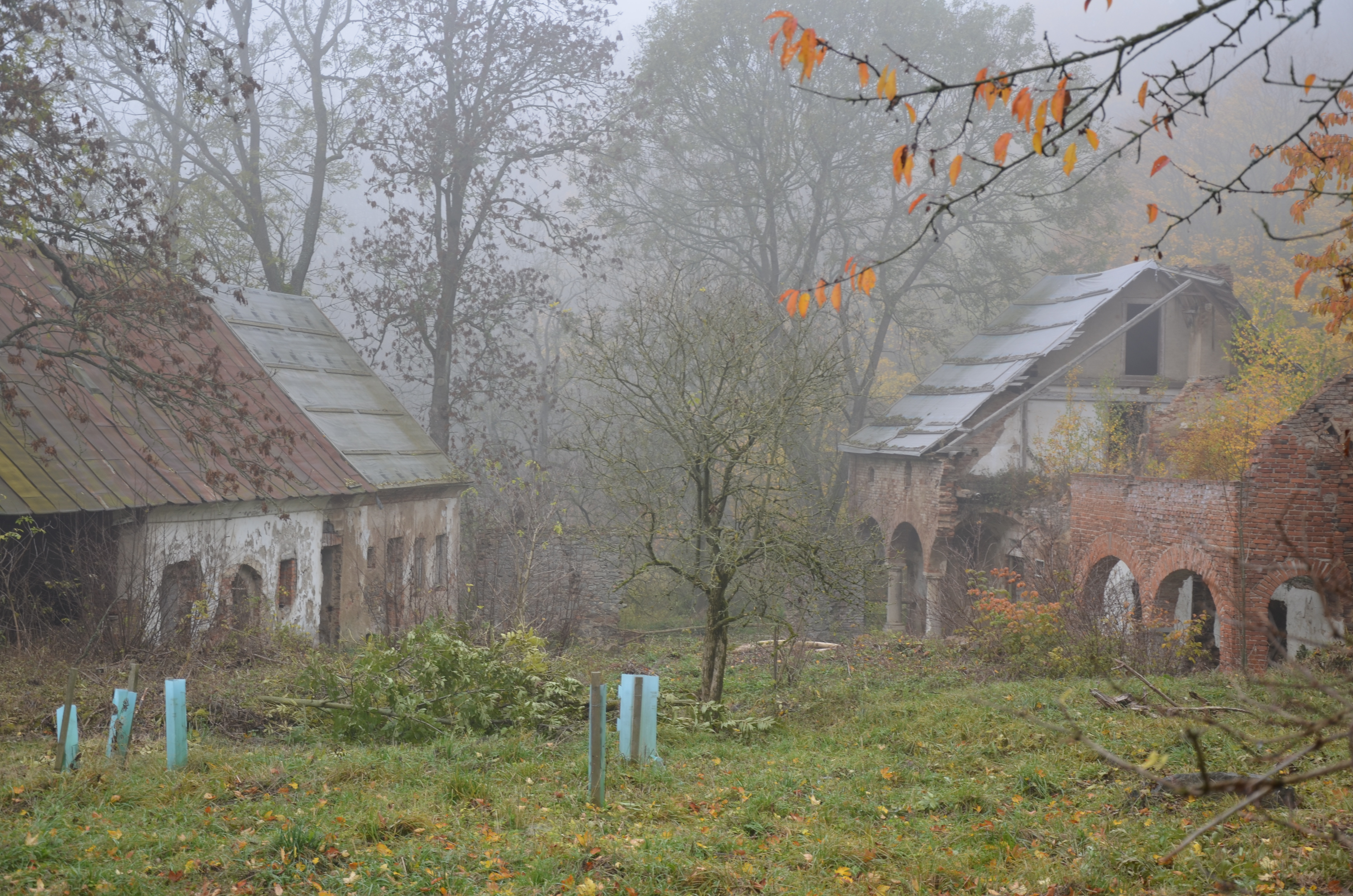 Venkovská usedlost (Vysočany), Vysočany